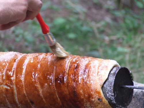 Kürtős kalács kenése